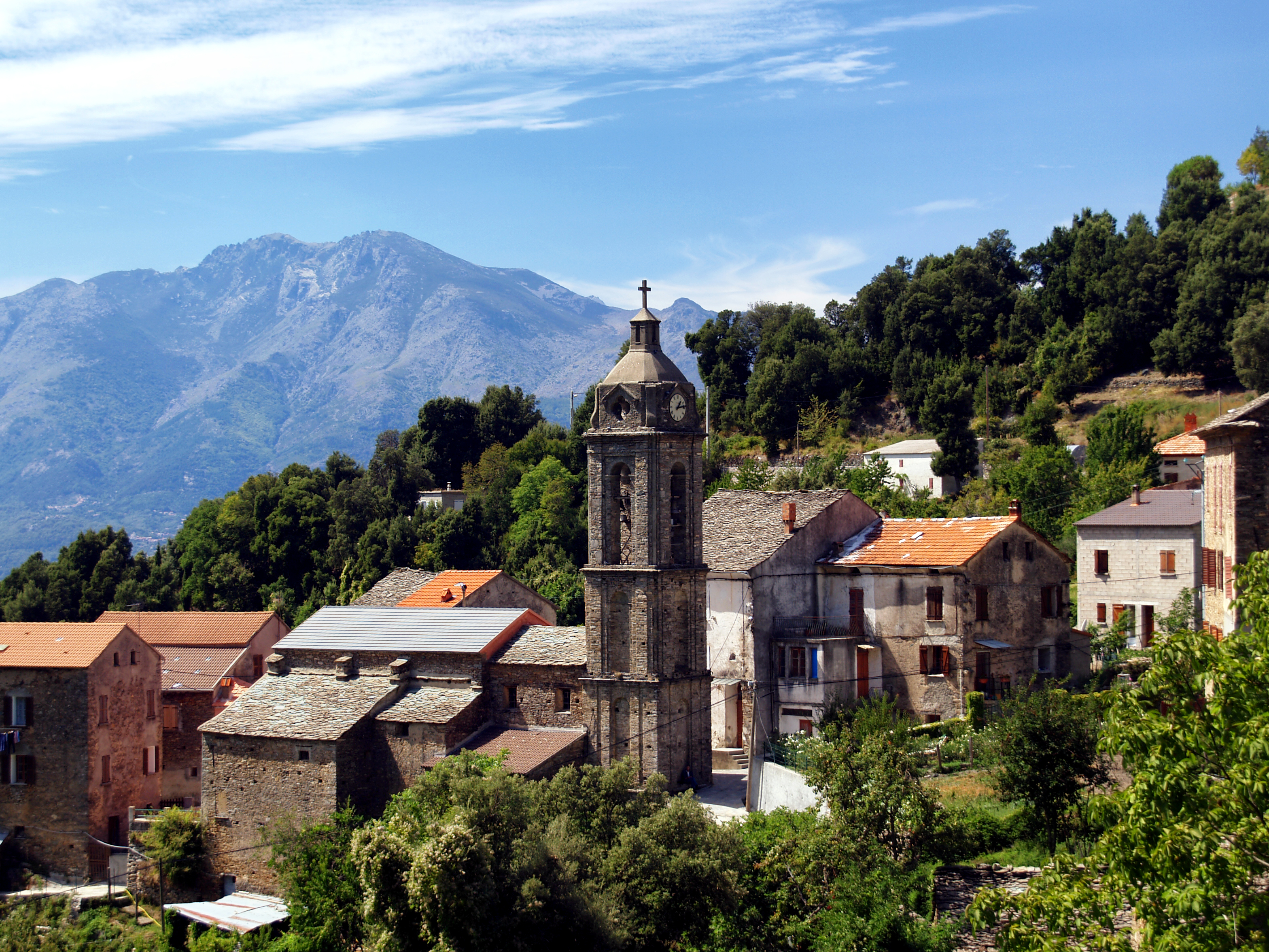 Bustanico, Bozio (Haute-Corse) - Clocher de l'église paroissiale Saint-Césaire (XVIe siècle; 1897), au centre du village de Sottano. En arrière-plan, le Monte Cardo.